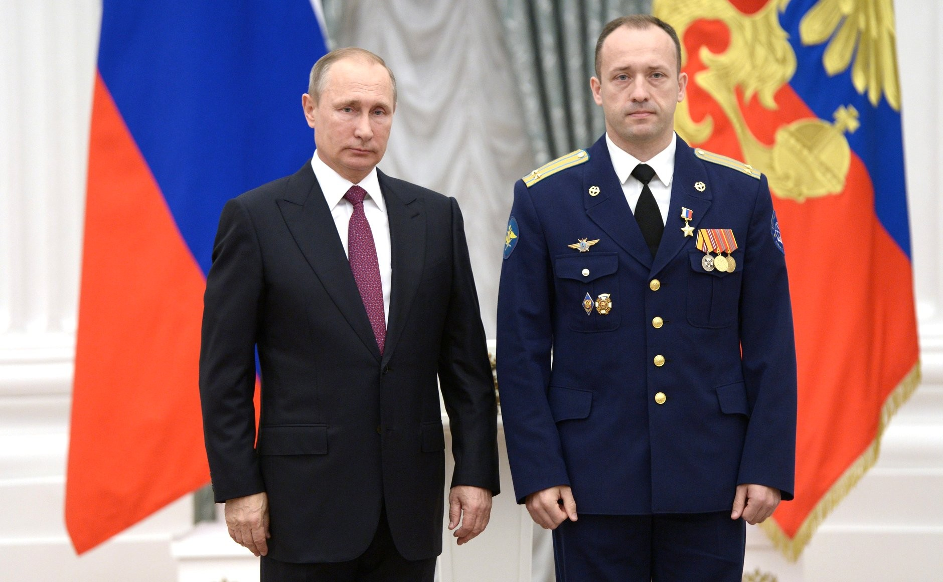 Вручение государственных наград Российской Федерации. Звание Героя Российской Федерации и почётное звание «Лётчик-космонавт Российской Федерации» присвоено инструктору-космонавту-испытателю – начальнику группы отряда космонавтов Научно-исследовательского испытательного центра подготовки космонавтов имени Ю.А.Гагарина Александру Мисуркину.